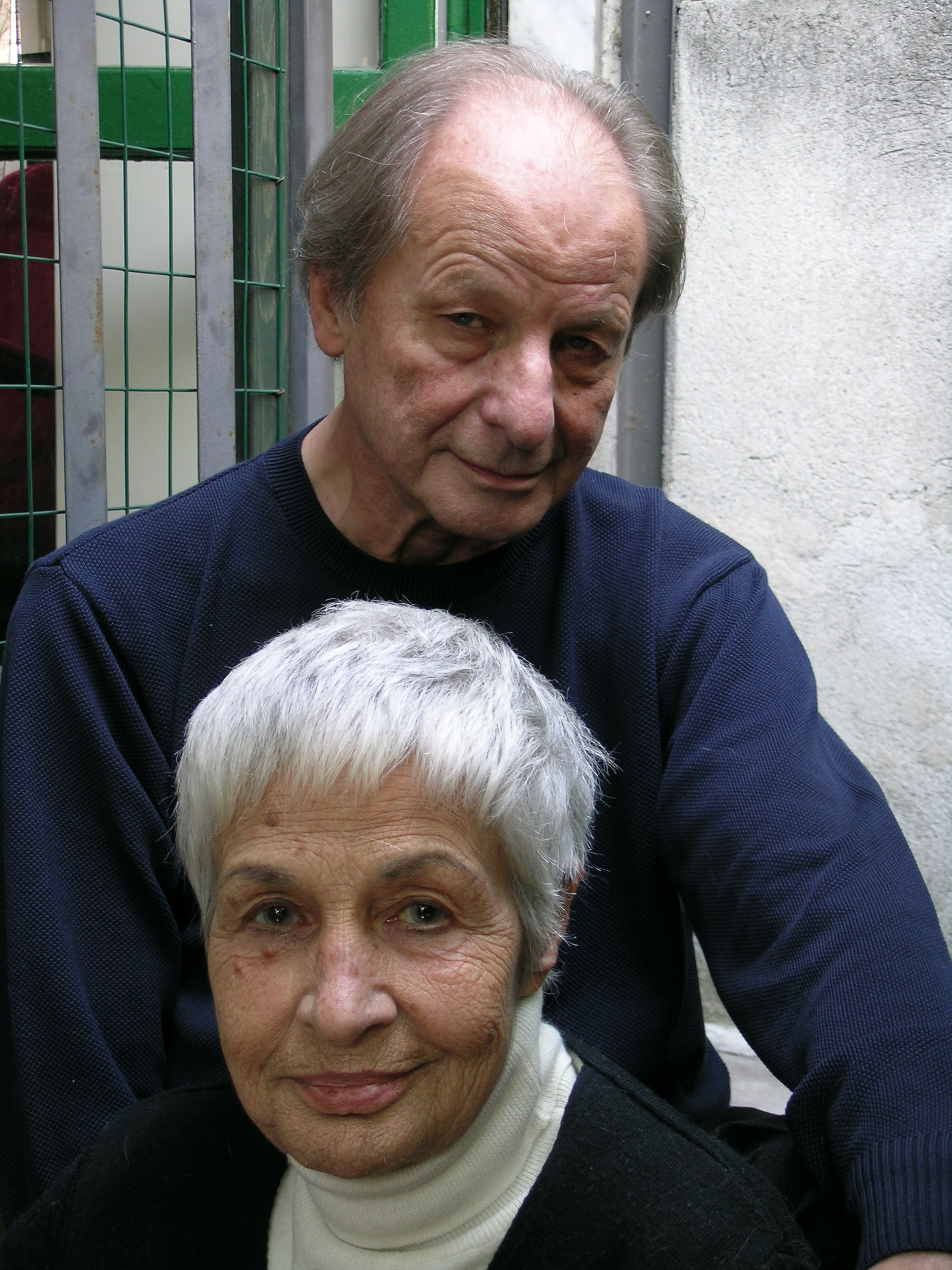 Giancarlo Buzzi con la moglie Marta.